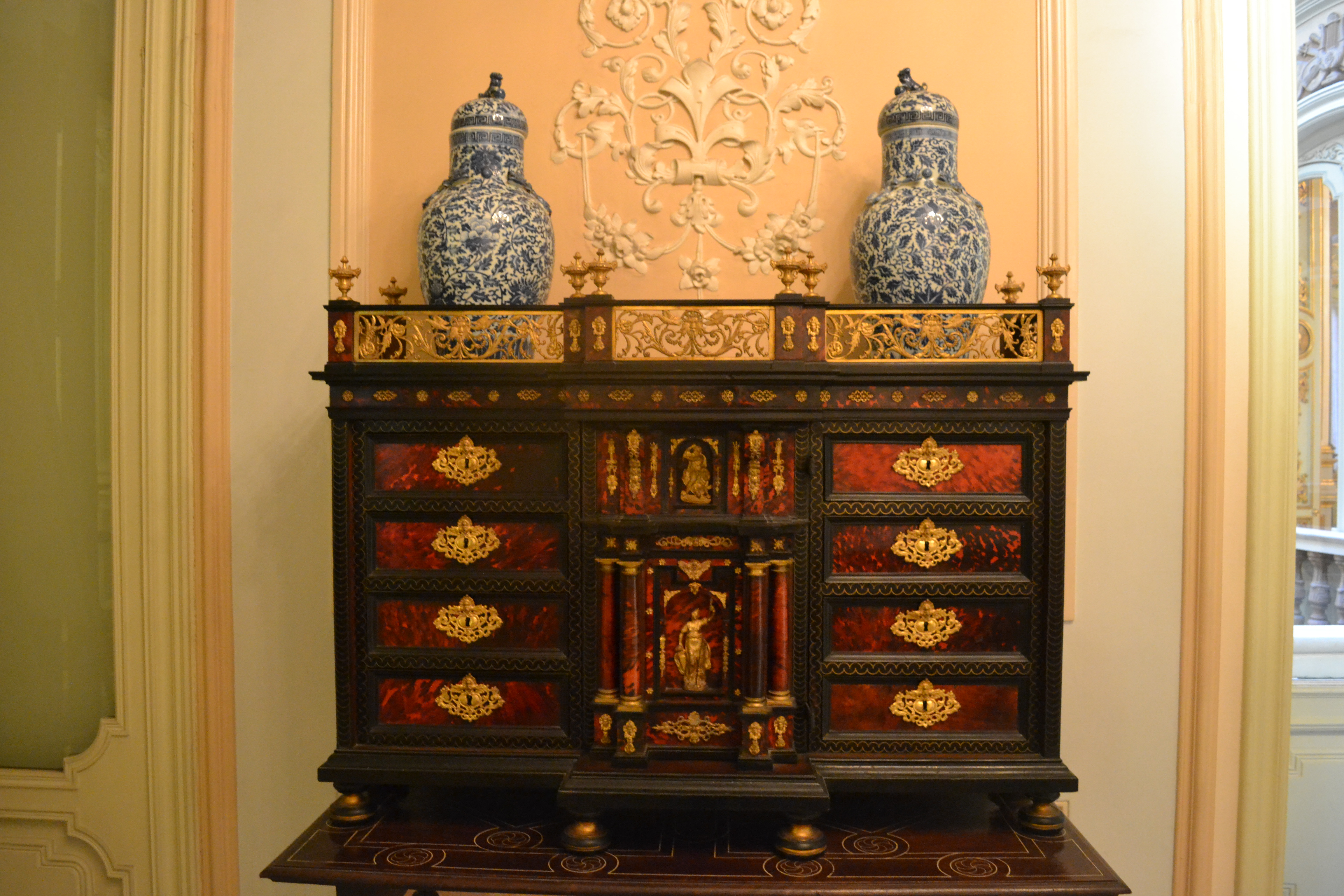 Bargueño de ébano y palisandro, latón hierro, carey y bronce. Siglo XIX. CE3/00733. Jarrones japoneses de porcelana. D06/01283. Vestíbulo del palacio del marqués de Dos Aguas.